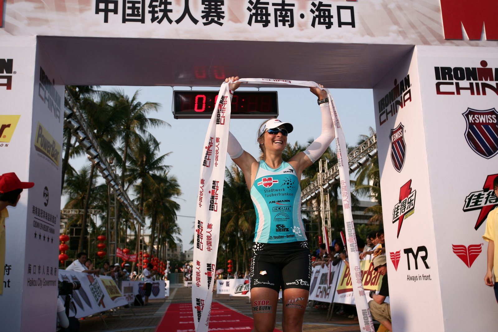 Heidi Jesberger – Zieleinlauf Ironman China 2010